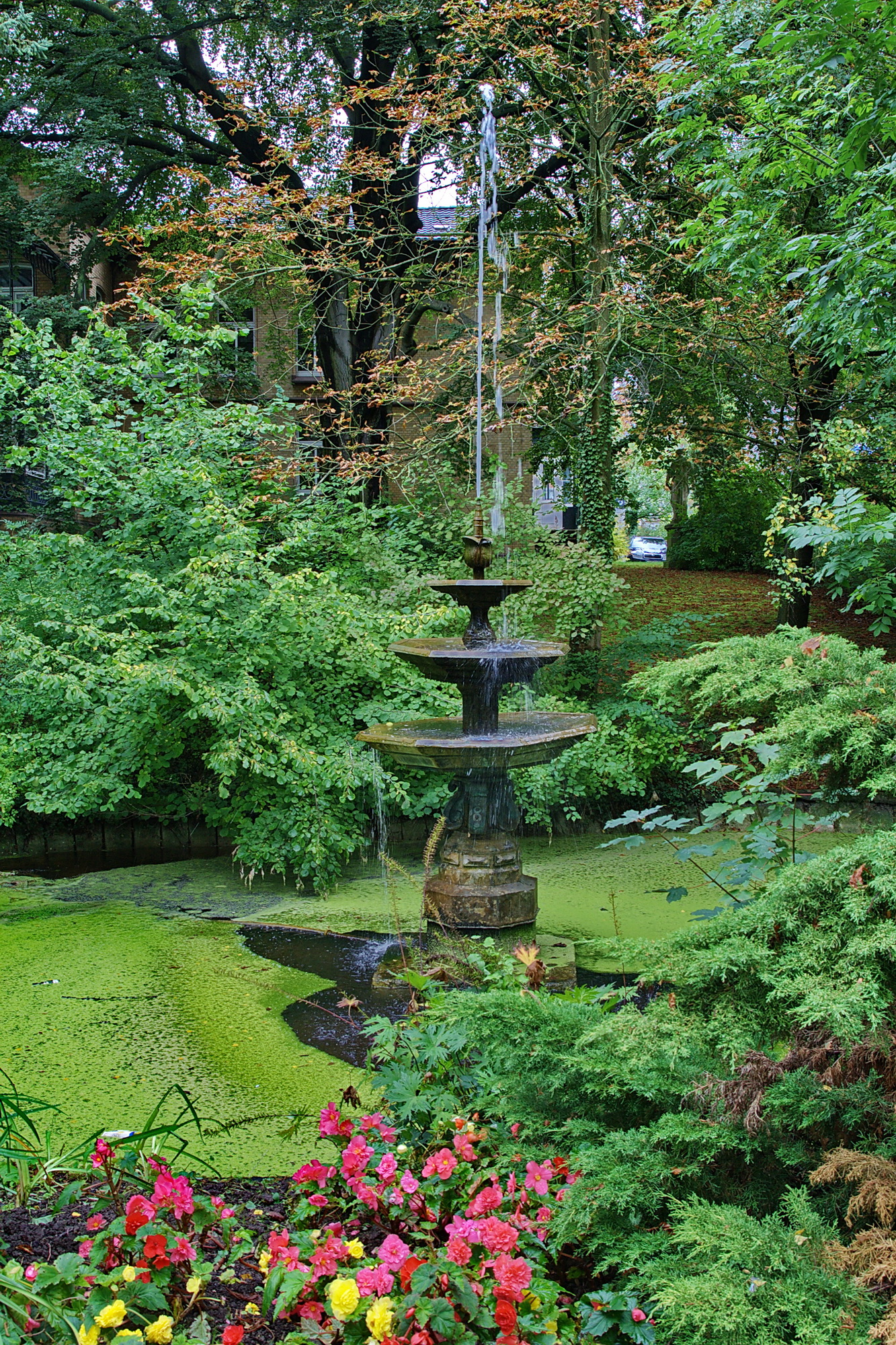 Grüner Brunnen im Stiftsgarten in Einbeck, Niedersachsen, Deutschland